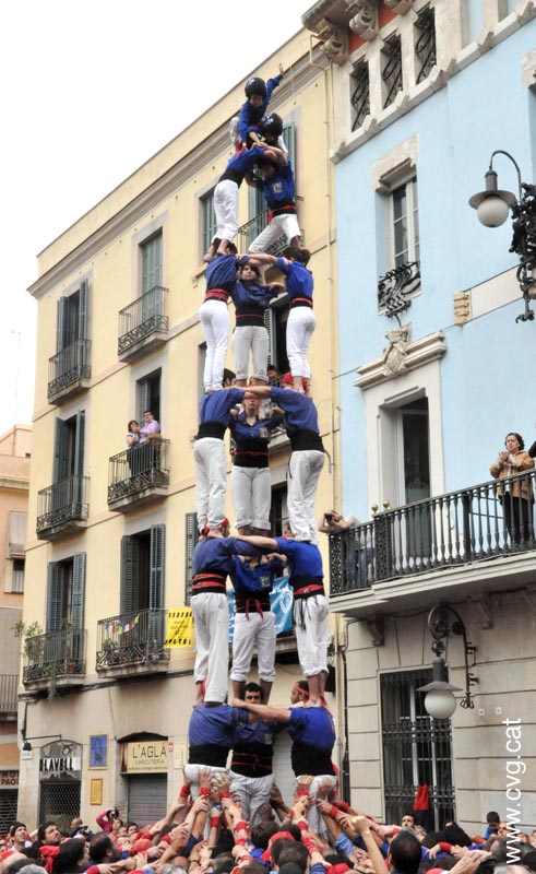 3 de 8 dels Castellers de la Vila de Gràcia (maig 2012)